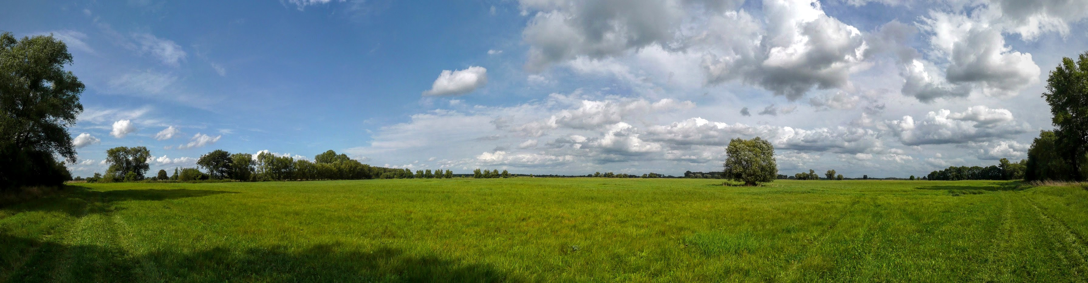 Panoramanansicht des Wulfener Bruchs